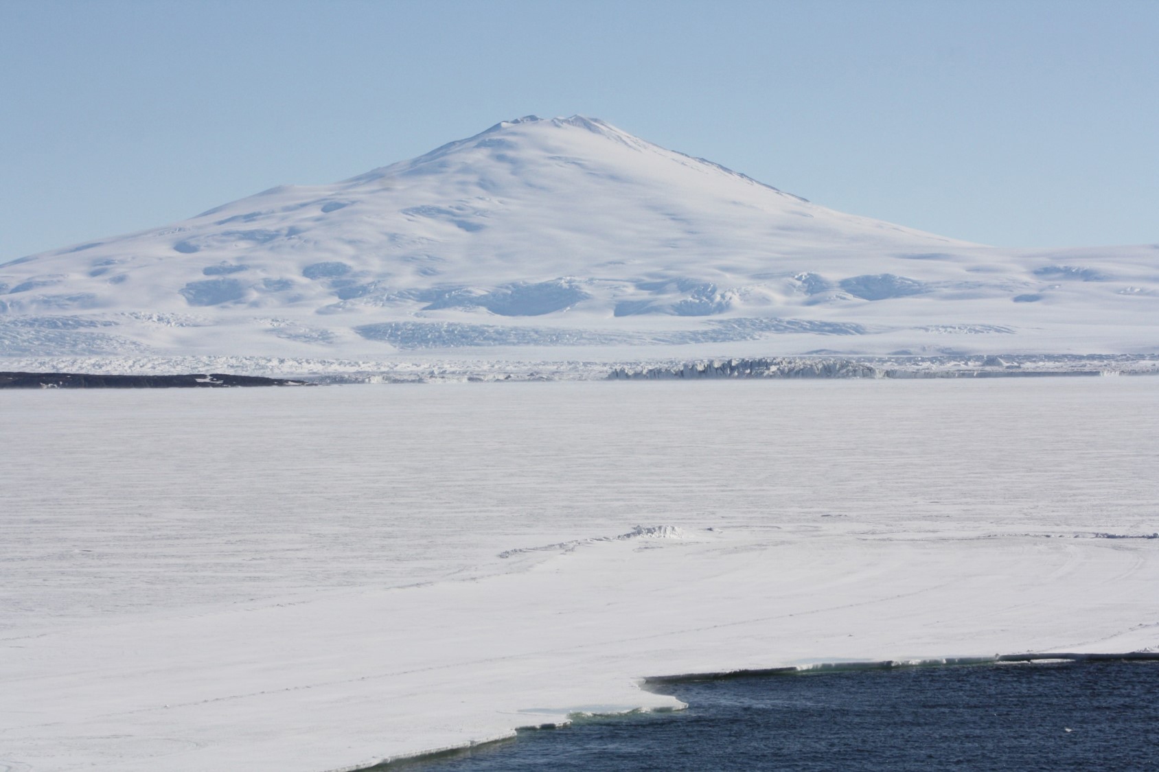 Wer glaubt, dass es in unserer globalisierten Welt keine Abenteuer für Forscher mehr gibt, der kann sich eines Besseren belehren lassen und sich an einer Expedition in die Antarktis beteiligen. Für die Expedition GANOVEX 11 sind im Dezember 2015 drei Forscher des DLR-Instituts für Planetenforschung in Berlin in Richtung Südpol aufgebrochen, um für die internationale Planetenforschung noch unbekannte antarktische Gebiete zu erkunden und gemäß ihrer geologisch-geomorphologischen Besonderheiten mit Strukturen auf dem Mars zu vergleichen. Zur Blogreihe #ExpeditionAntarktis